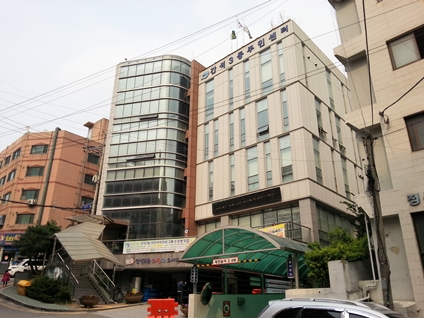 간석3동 주민센터.